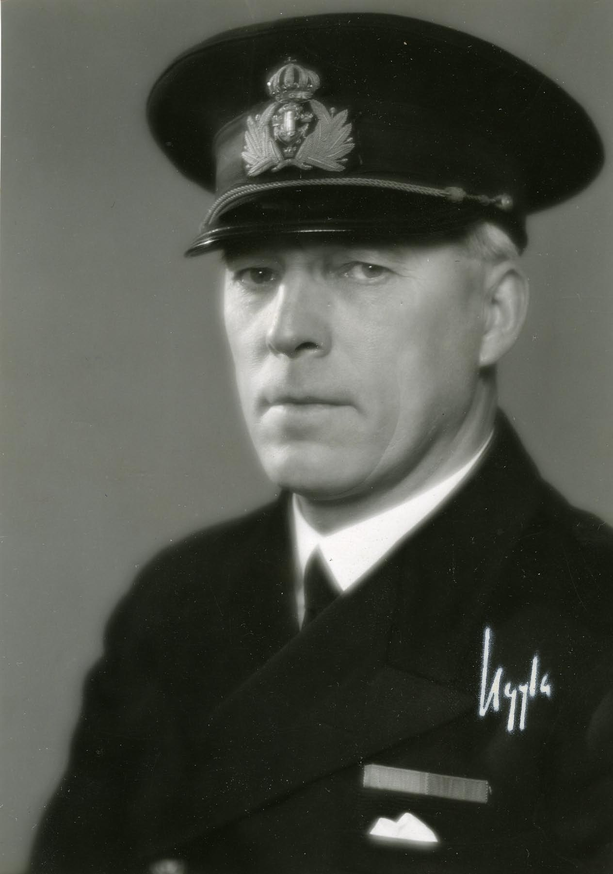 Kommendör Jens H. Stefenson (1895-1986), chef för Kungl. Sjökrigsskolan 1943-1949 och för Karlskrona örlogsstation 1949-1955. Far till amiralen Bror Stefanson.